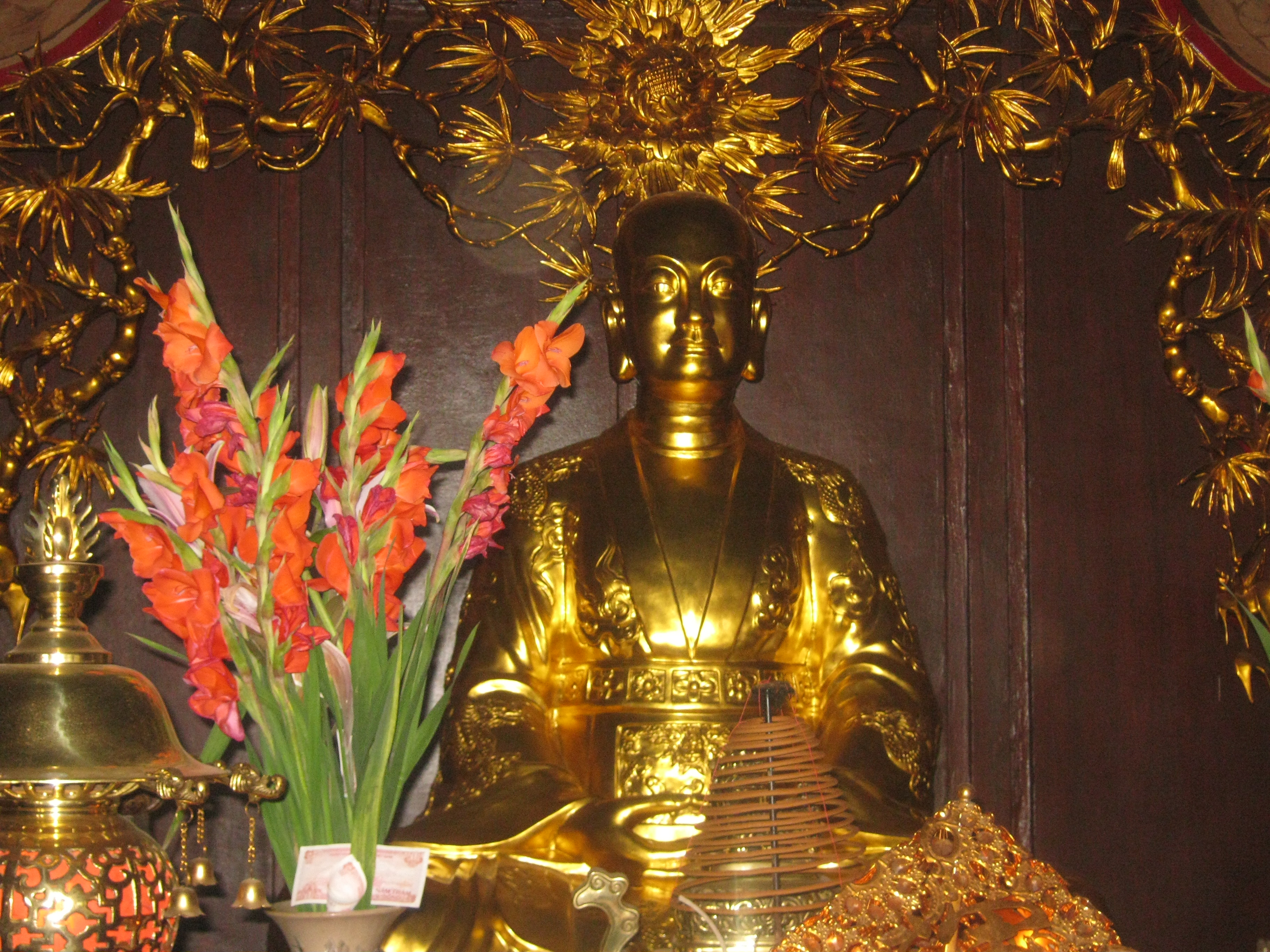 Ảnh chụp tại khu chùa Bái Đính tỉnh Ninh Bình.